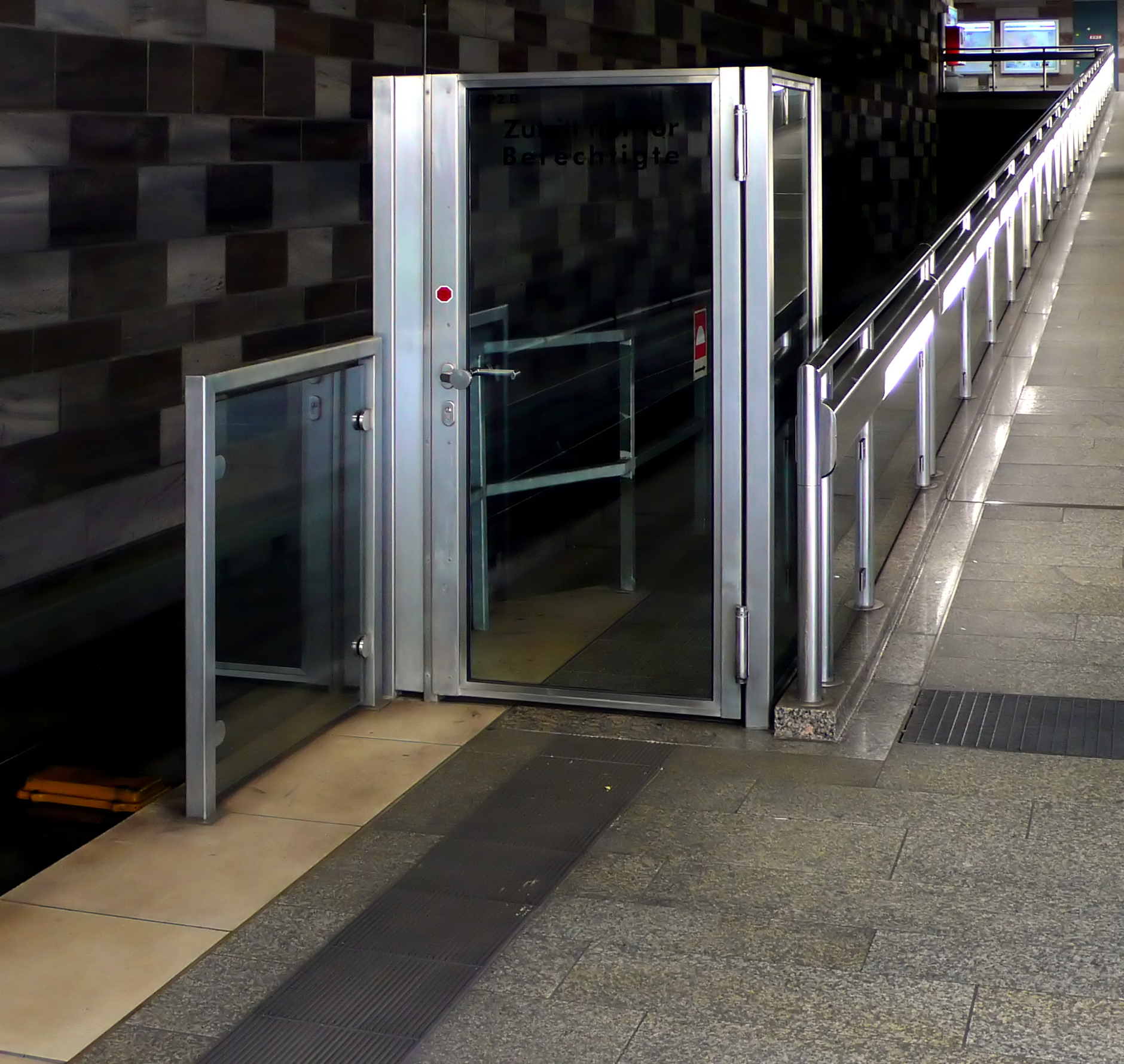 U-Bahn Nürnberg, Bahnsteigabschlusstüre im Bahnhof Opernhaus